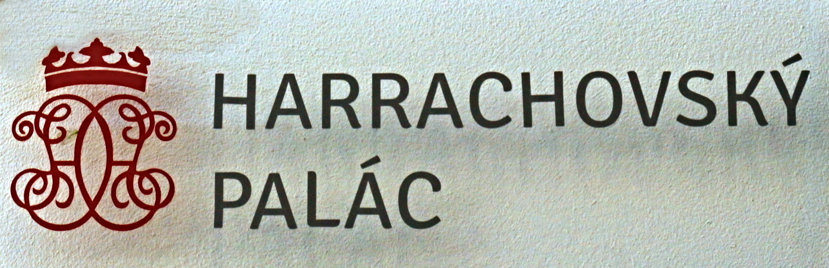 Harrachovský palác v Praze